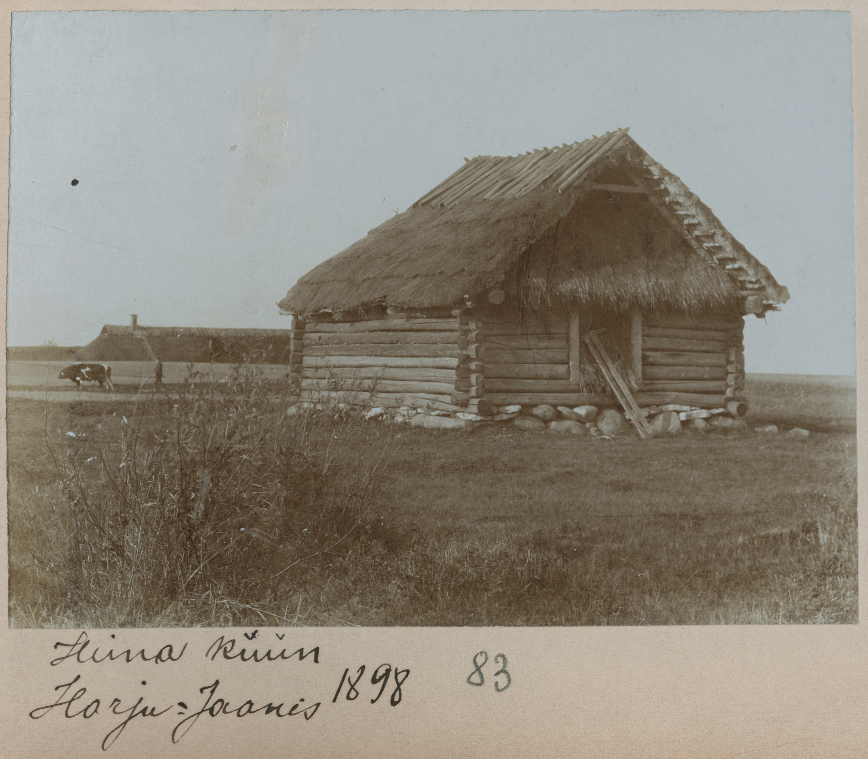 heinaküün Harju-Jaanis